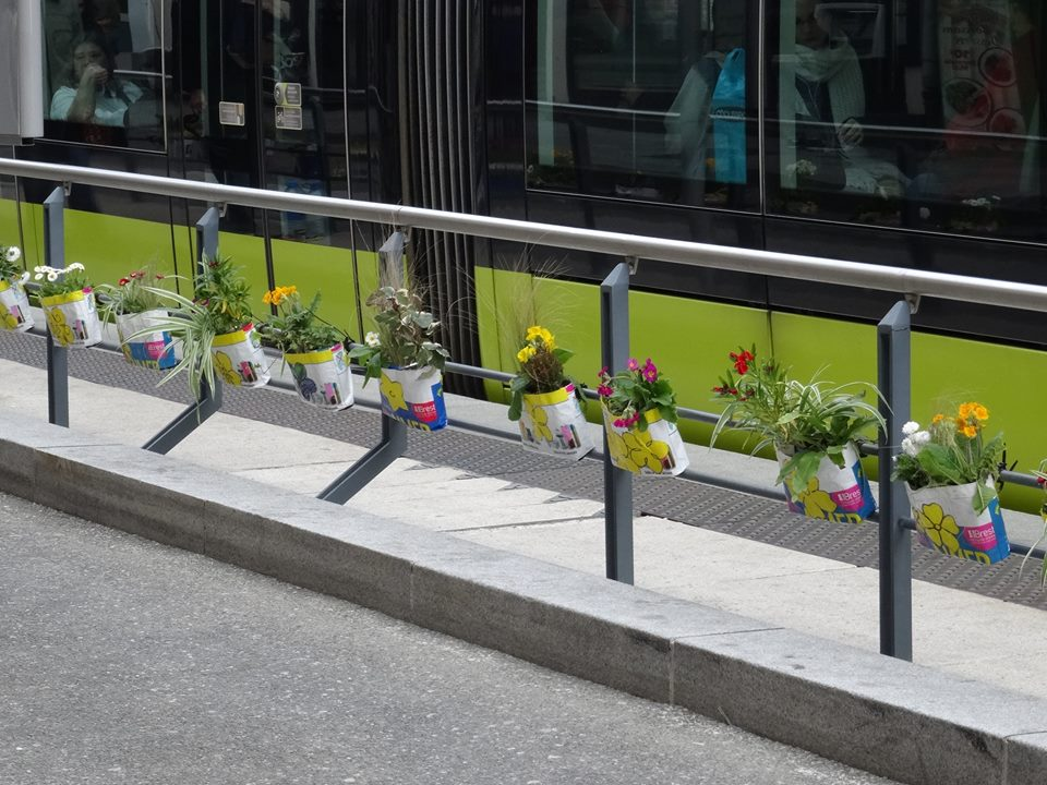 Jardinières accrochées à la balustrade de la station de tram Octroi